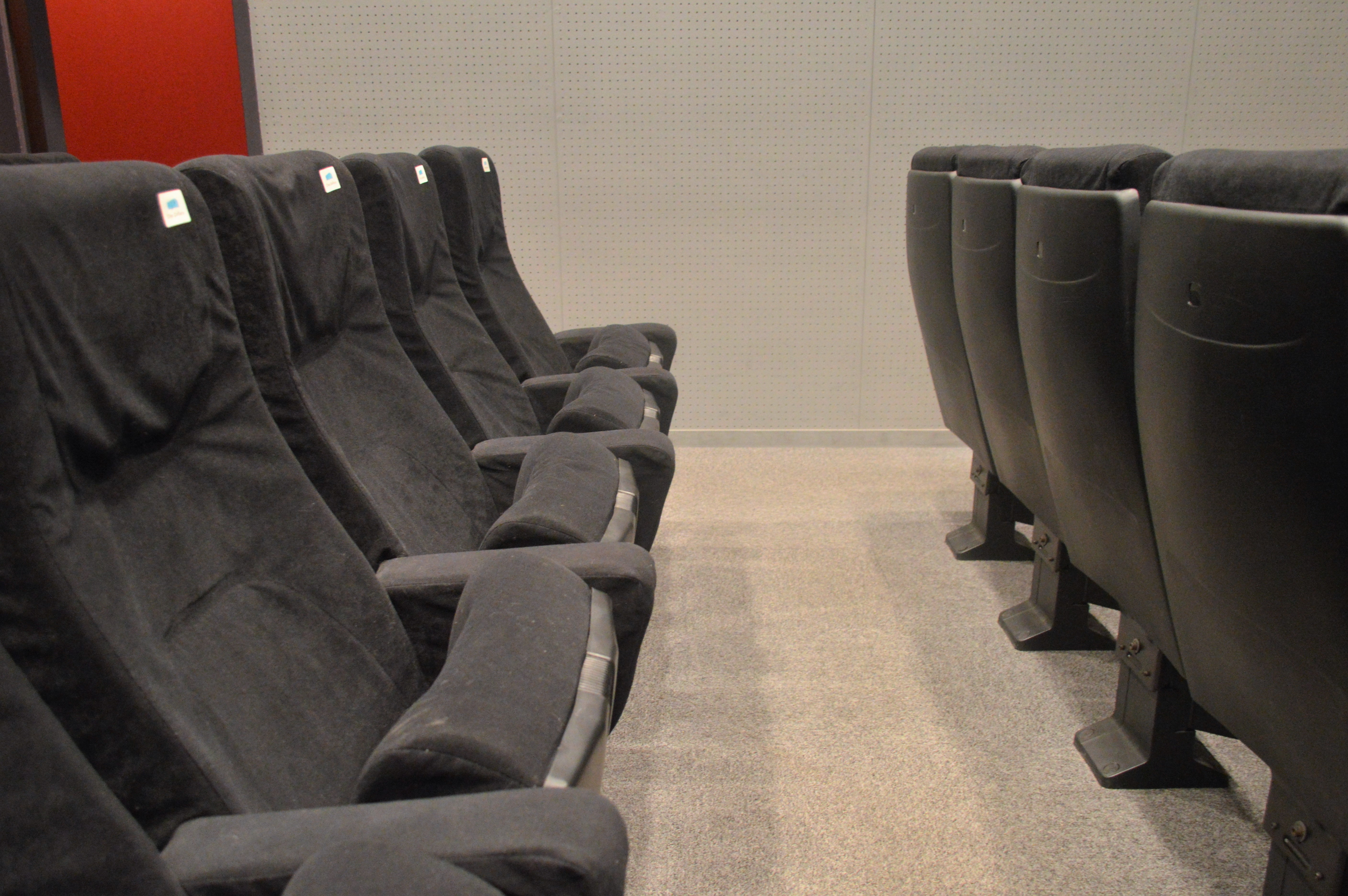 静岡市のサールナートホールに入っている映画館（ミニシアター）、静岡シネ・ギャラリー。